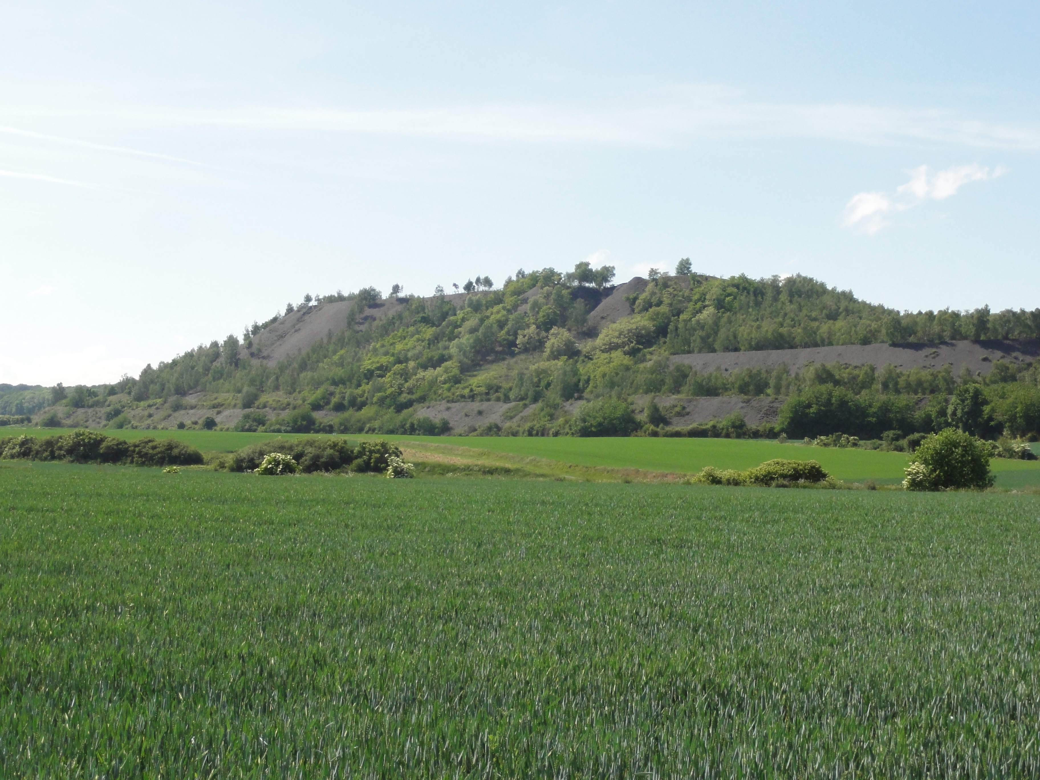 Terril n° 75 dit Pinchonvalles, fosse n° 6 - 6 bis de la Compagnie des mines de Liévin dans le bassin minier du Nord-Pas-de-Calais, Avion, Pas-de-Calais, Nord-Pas-de-Calais, France. Le terril no 75 est inscrit sur la liste du patrimoine mondial de l'Unesco le 30 juin 2012 et y constitue en partie le site no 76.